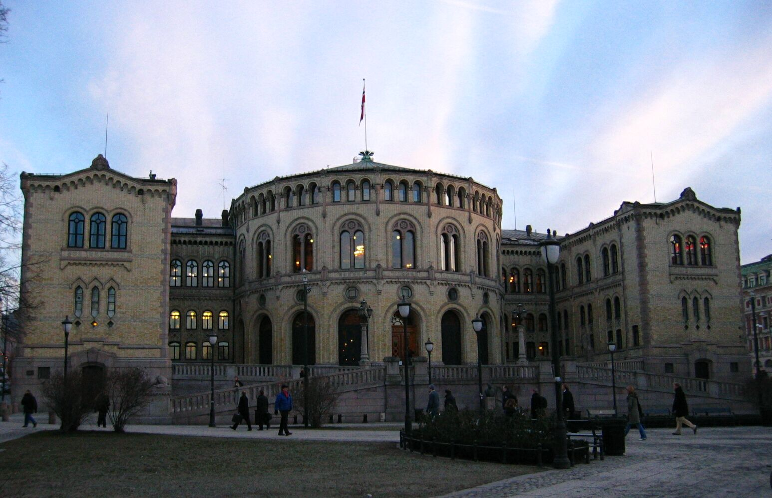 Det norske Stortinget The Norwegian Parliament